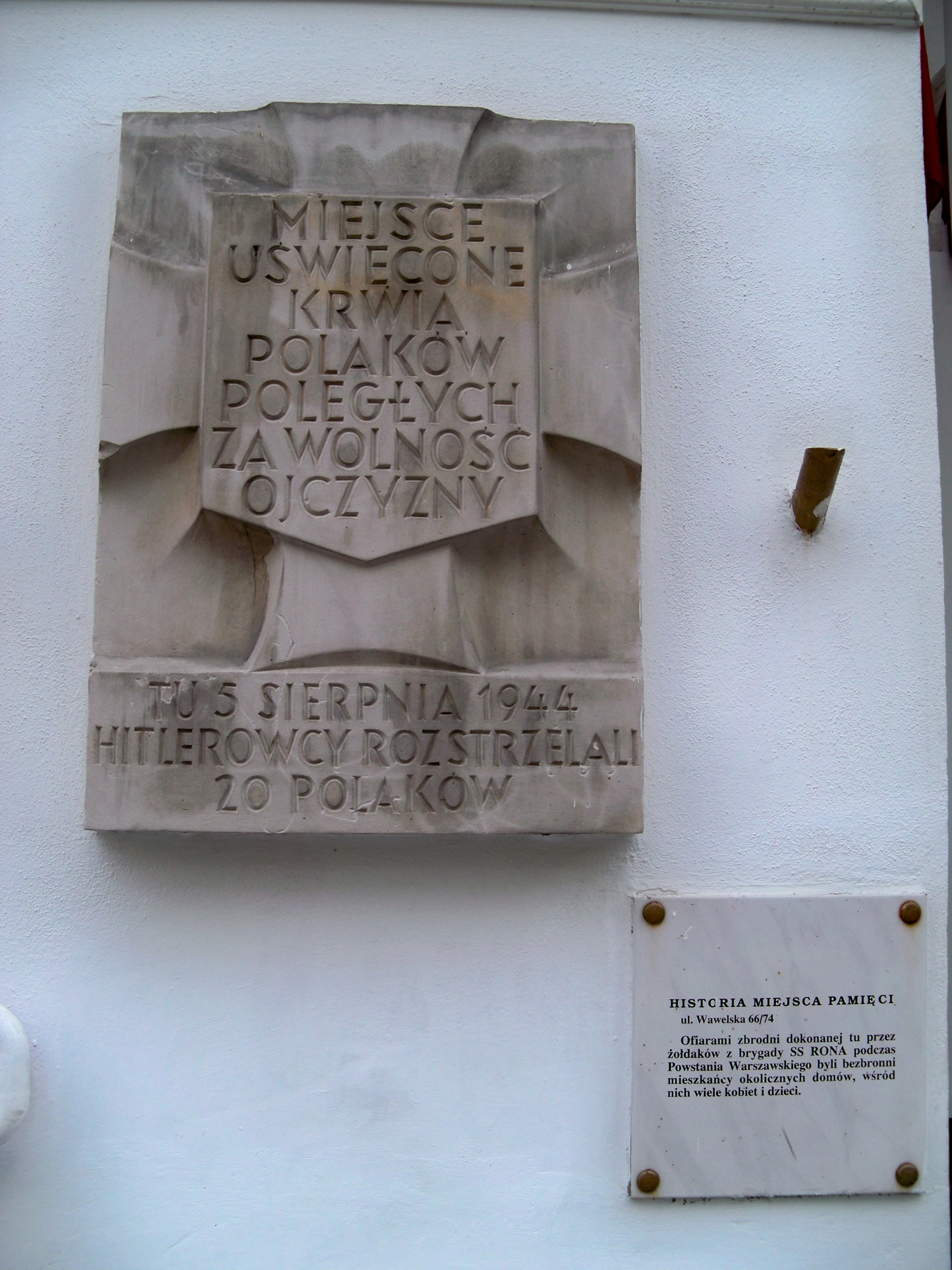 Tablica upamiętniająca jedno z miejsc rzezi Ochoty. Budynek przy Wawelskiej 66/74.